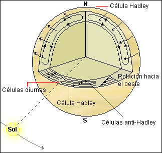 Autor: Usuario:Luis María Benítez